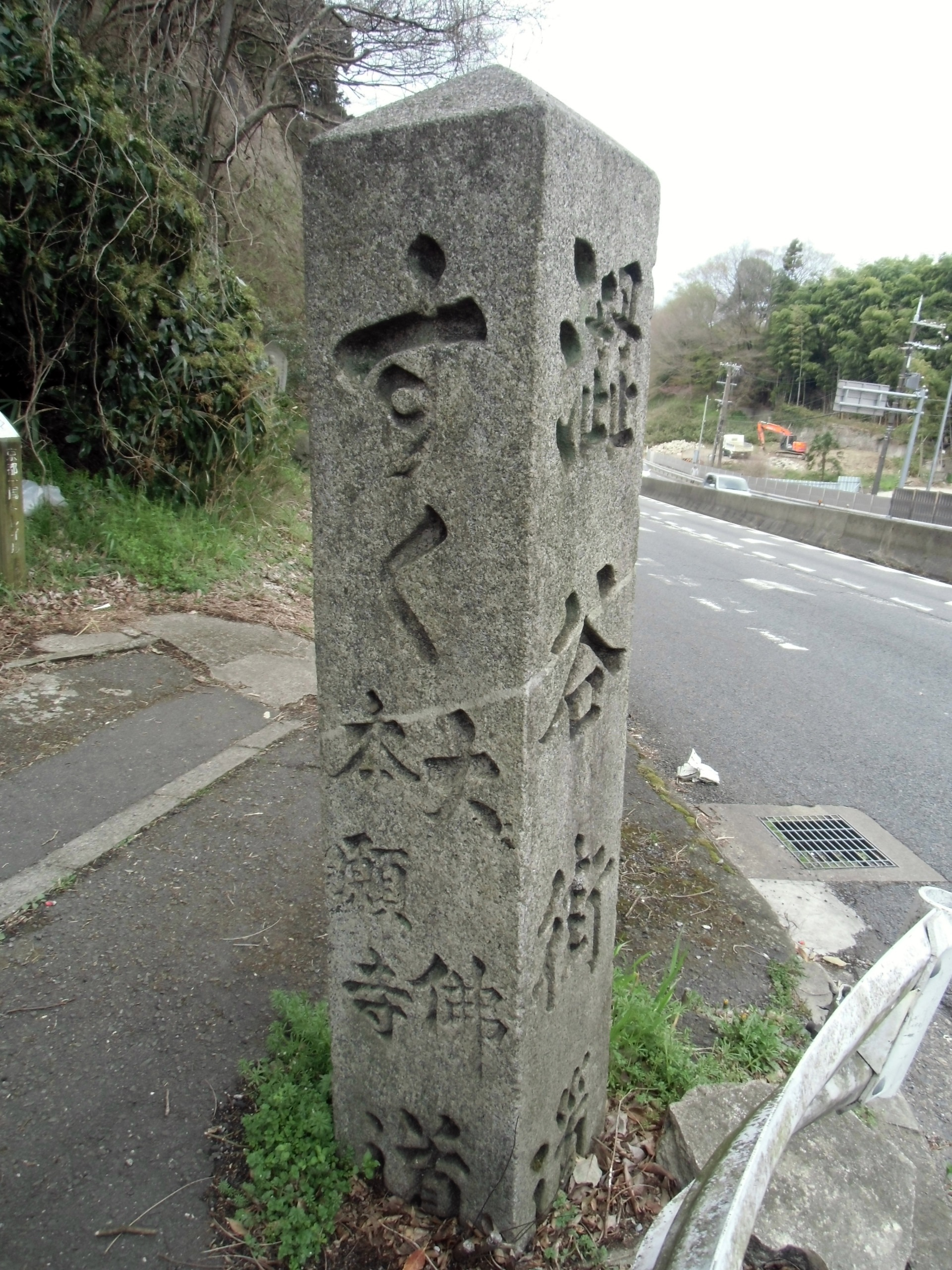 国道1号五条バイパス脇にある渋谷街道の碑